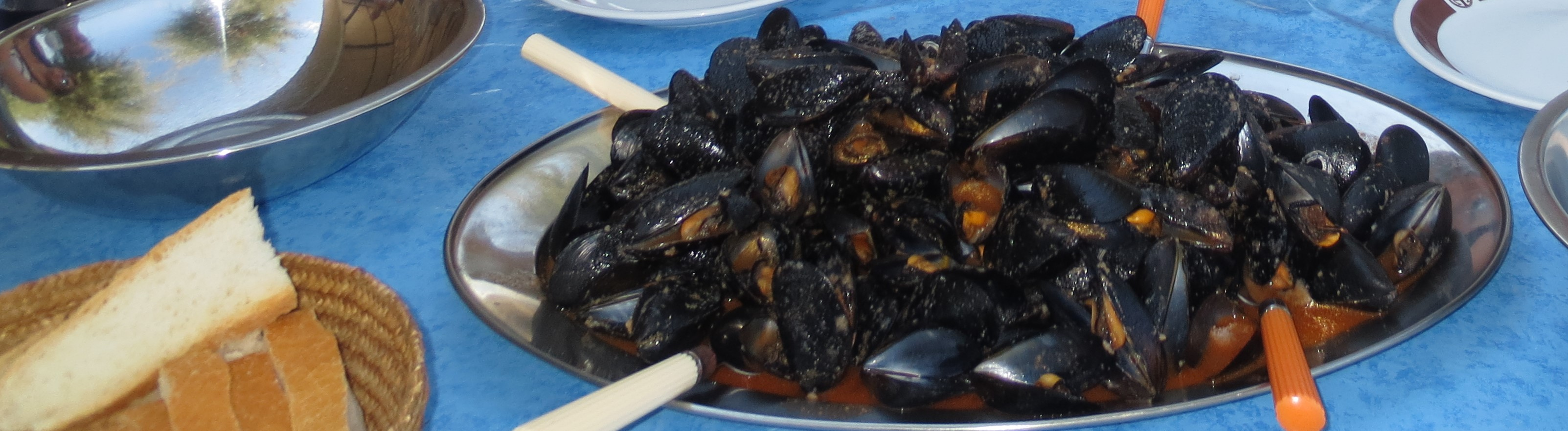 dagnje na rdeči buzari, Pelješac